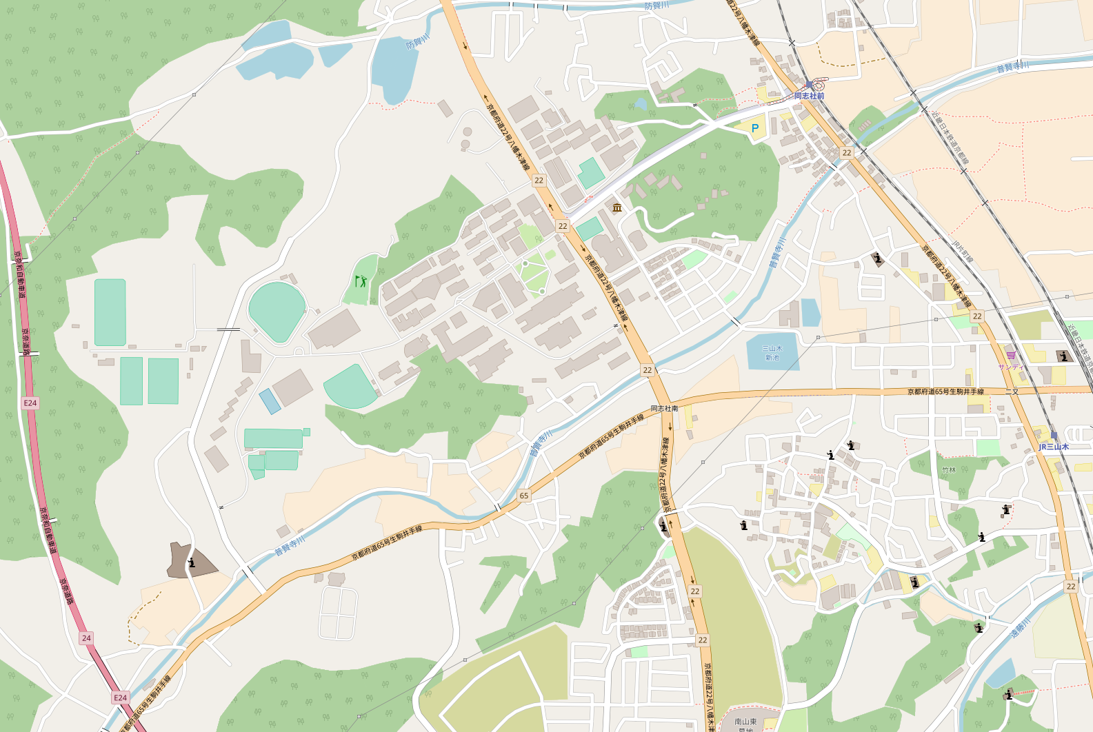 同志社大学京田辺キャンパス top = 34.8074 bottom = 34.7918 left = 135.7573 right = 135.7856